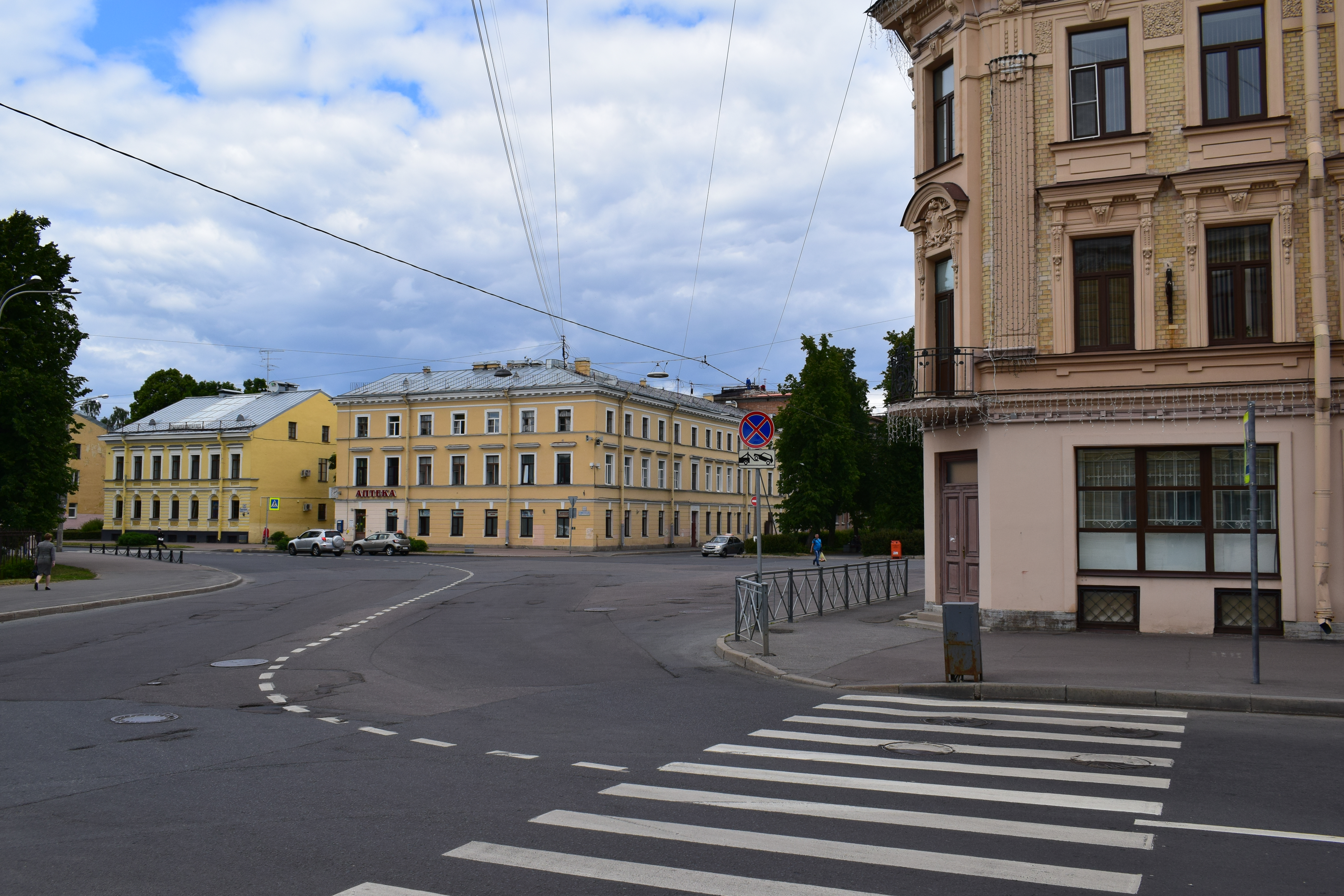 Пересечение улиц Советской и Комсомола в Кронштадте